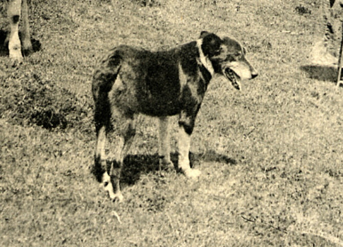 Probable chien de berger d'Auvergne. Puy-de-Dôme, années 1910. Photographie prise entre 1910 et 1920, dans le Puy-de-Dôme. Auteur inconnu.